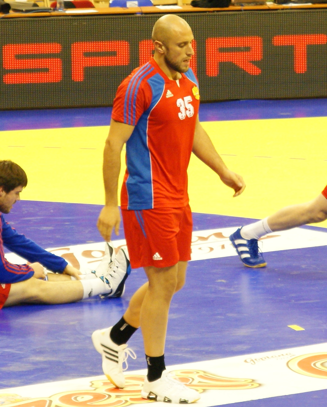 Konstantin Igropulo Mecz Polska - Rosja, Turniej Reprezentacji Narodowych Mężczyzn w Piłce Ręcznej, Hala widowiskowo-sportowa Arena, Poznań, Polska.